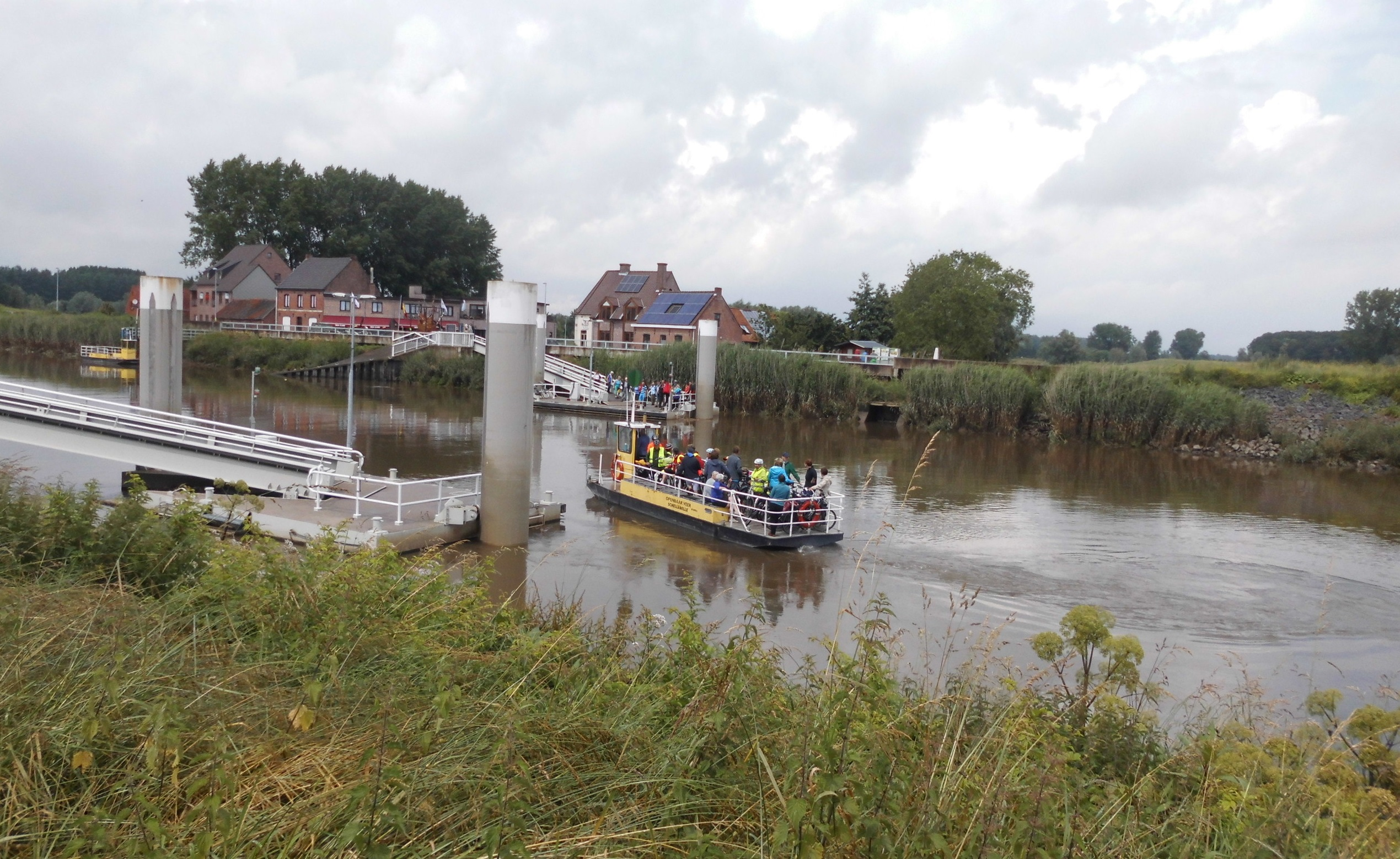 Het veerpont nabij het centrum van Schellebelle - foto genomen kant Schellebelle - Wichelen - Oost-Vlaanderen - België